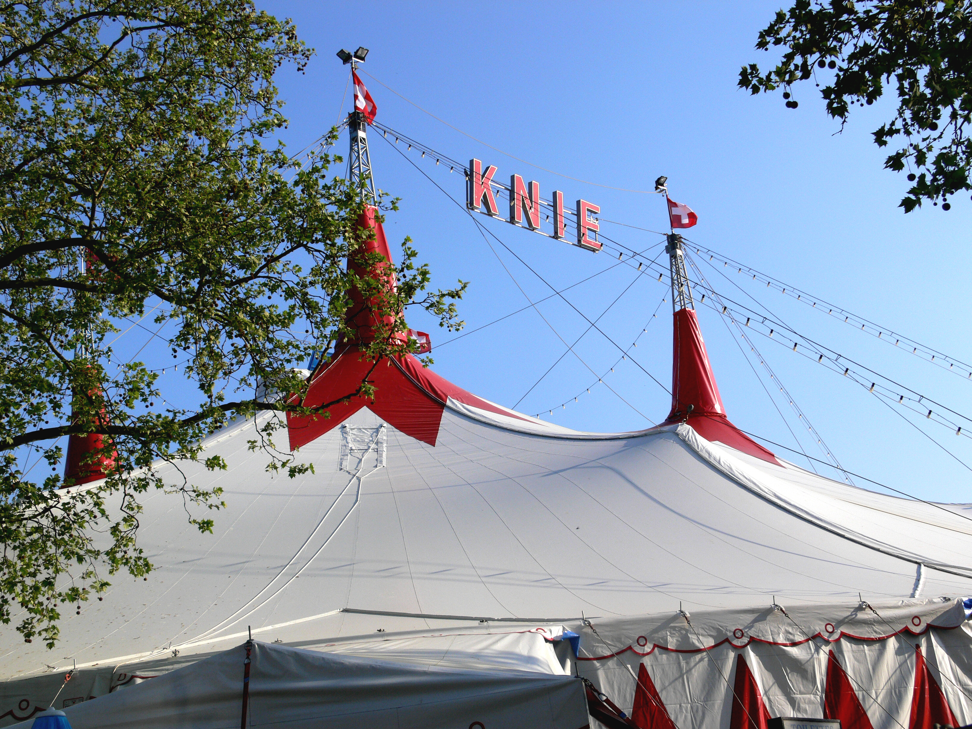 Zürich, Circus Knie, am Theaterplatz aufgebautes Zelt